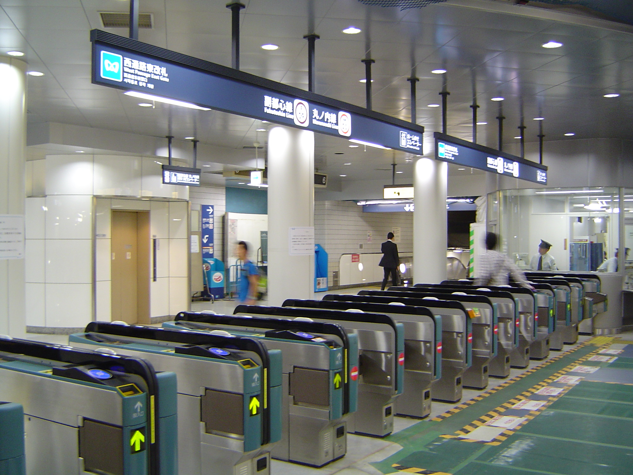 池袋駅（東京メトロ丸ノ内線・副都心線）西通路東改札